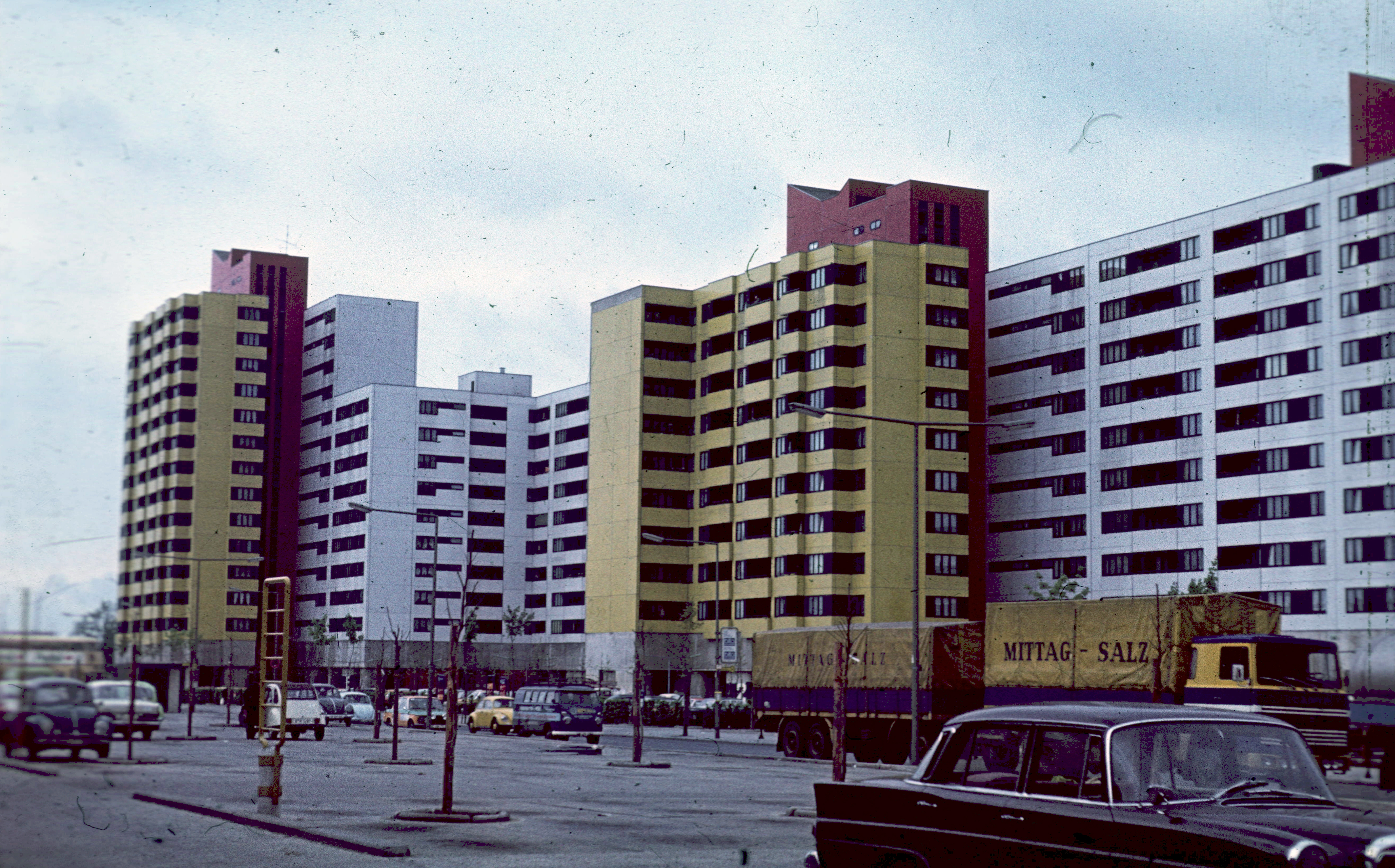 lakóház a Märksches Viertelben. Location: Germany, Berlin Tags: West Berlin, colorful, automobile, Gerrman brand, Mercedes-brand, commercial vehicle, trailer Title: lakóház a Märksches Viertelben.